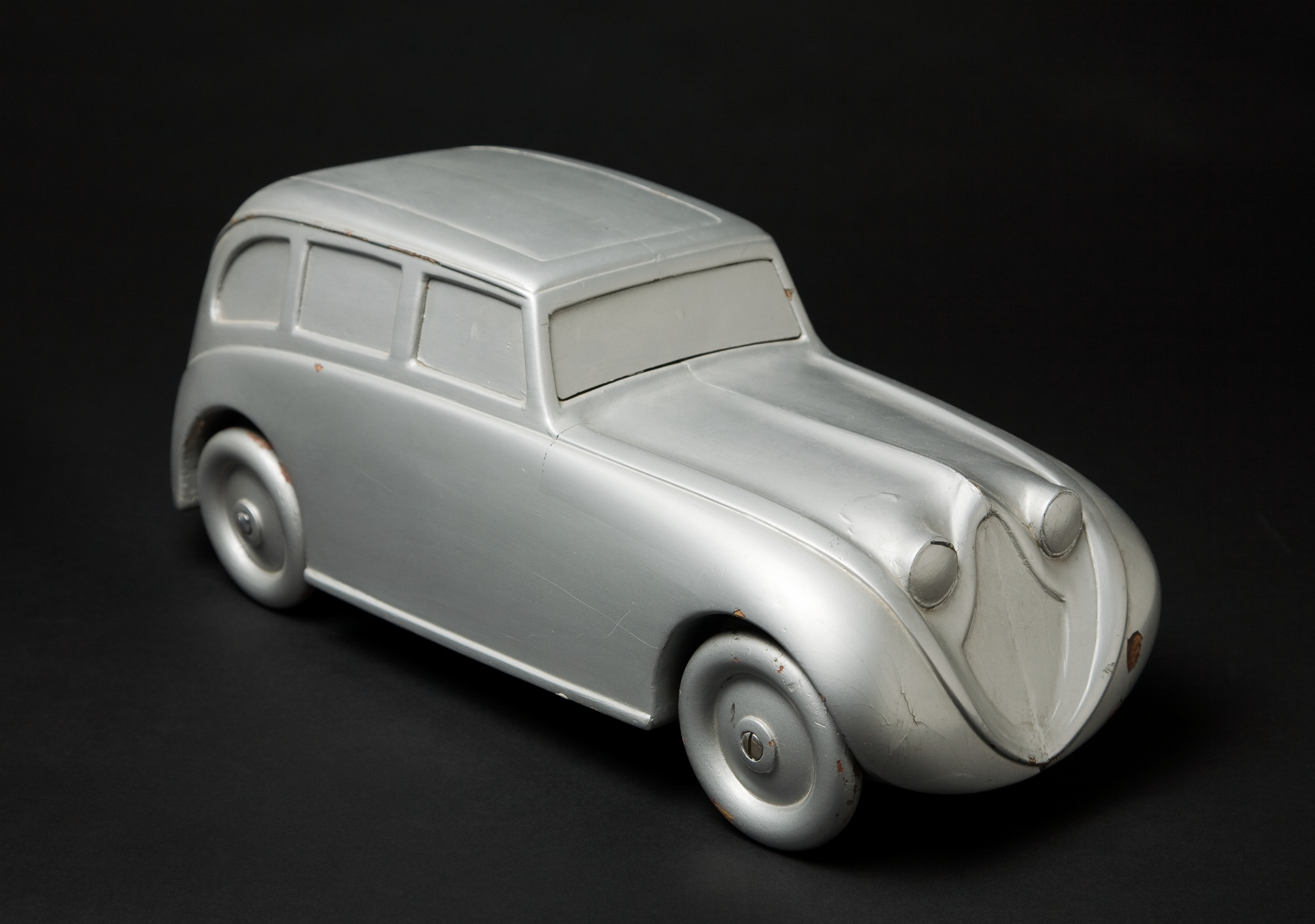 Modellbil i skala 1:10 ur Tekniska museets samlingar.